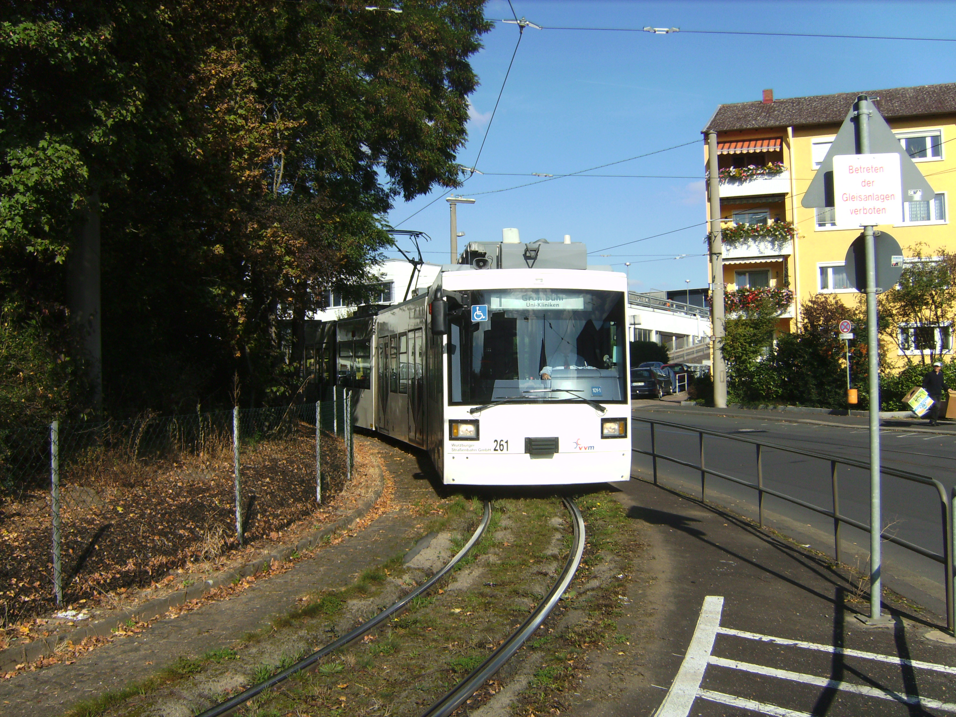 Ein Triebzug des Typs GT-N (Fahrzeugnummer 261) der Würzburger Straßenbahn fährt als Linie 1 in die Wendeschleife an der Endhaltestelle Königsberger Straße im Stadtteil Sanderau ein